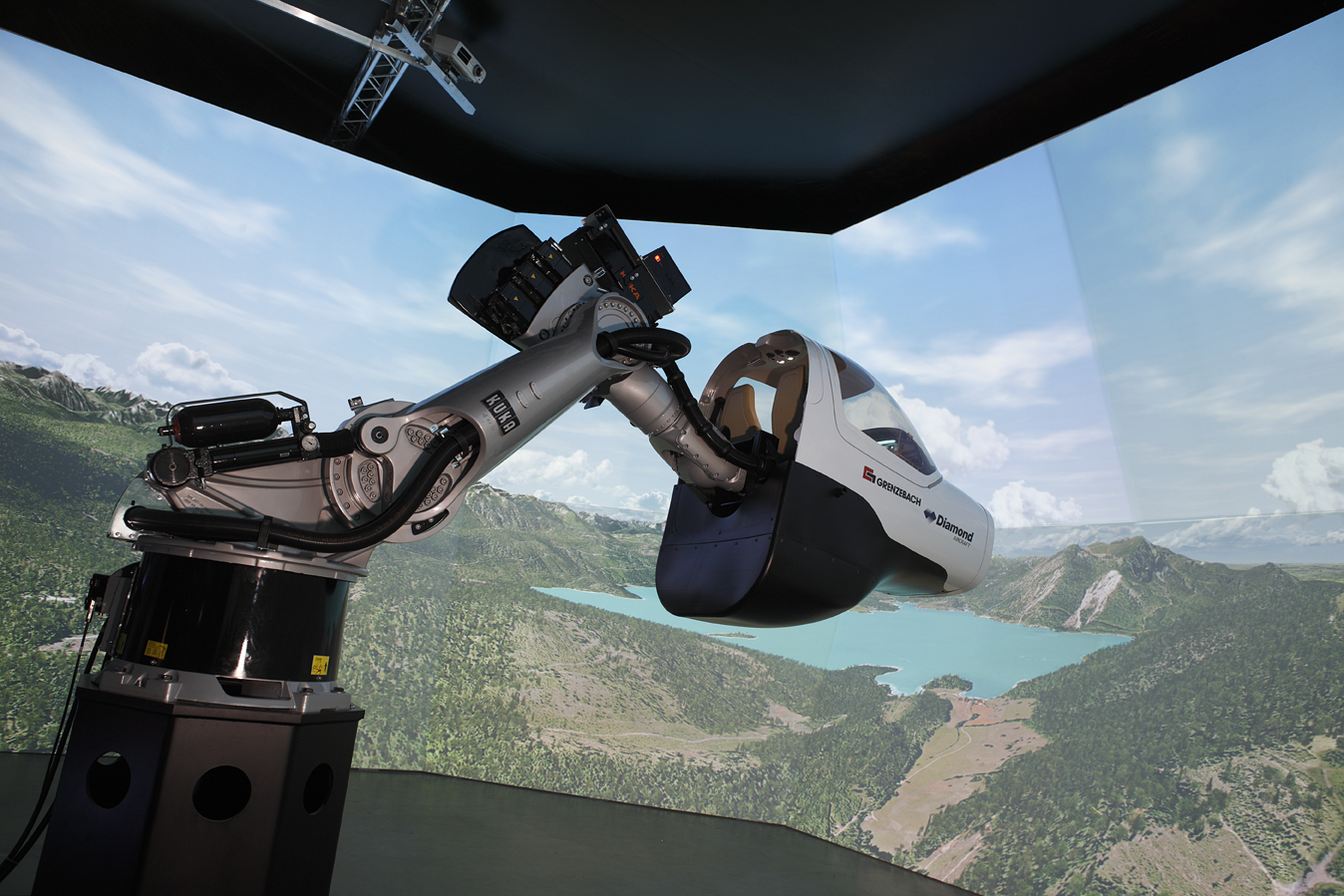 Grenzebach hat den ersten roboterbasierten Flugsimulator 'FlightSim' realisiert. Er bekommt die Zulassung „Zero Flighttime“ nach der höchsten Stufe „D“ und ist für die Flugzeugmuster Diamond DA 40/42 entwickelt. Mit seinen sechs Bewegungsachsen ist der FlightSim herkömmlichen Bewegungsplattformen für Flugsimulatoren weit voraus. Die zugehörige Datenbank erlaubt das Training von Instrumentenflügen, Sicht- und Nachtflügen an allen Flugplätzen der Welt. Dabei können die Flugschüler alle Situationen im technischen und wetterbedingten Grenzbereich trainieren.